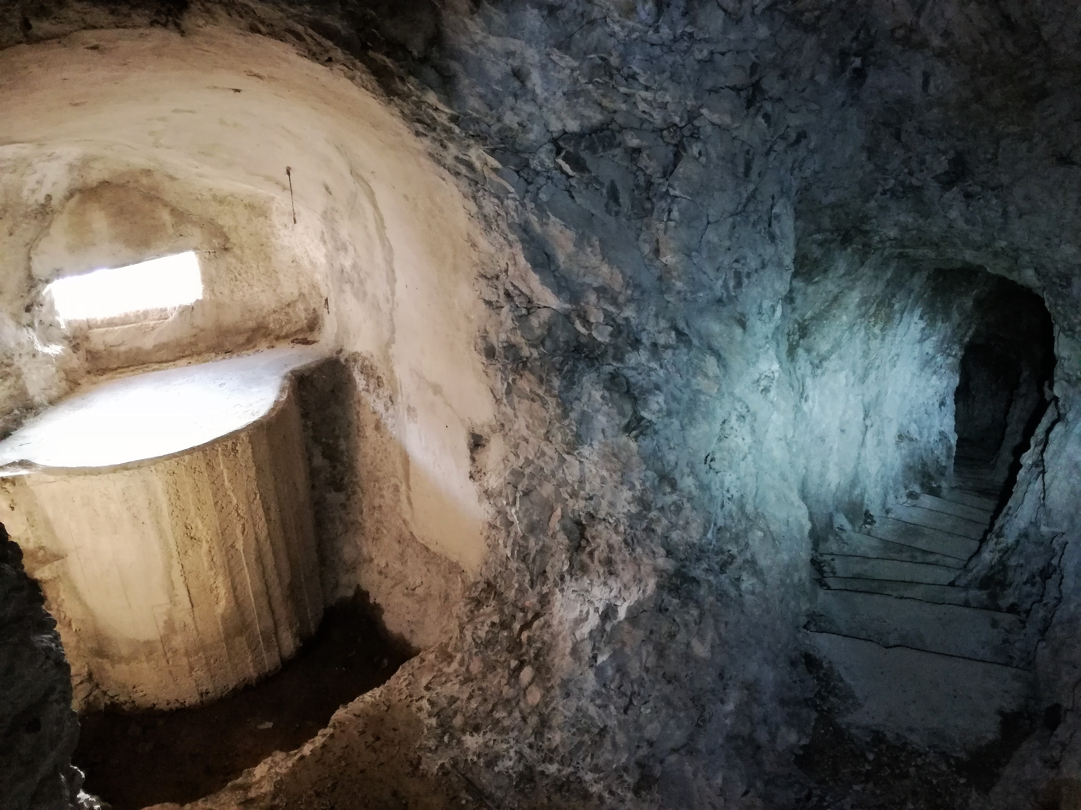 Blaue Linie Nago-Torbole